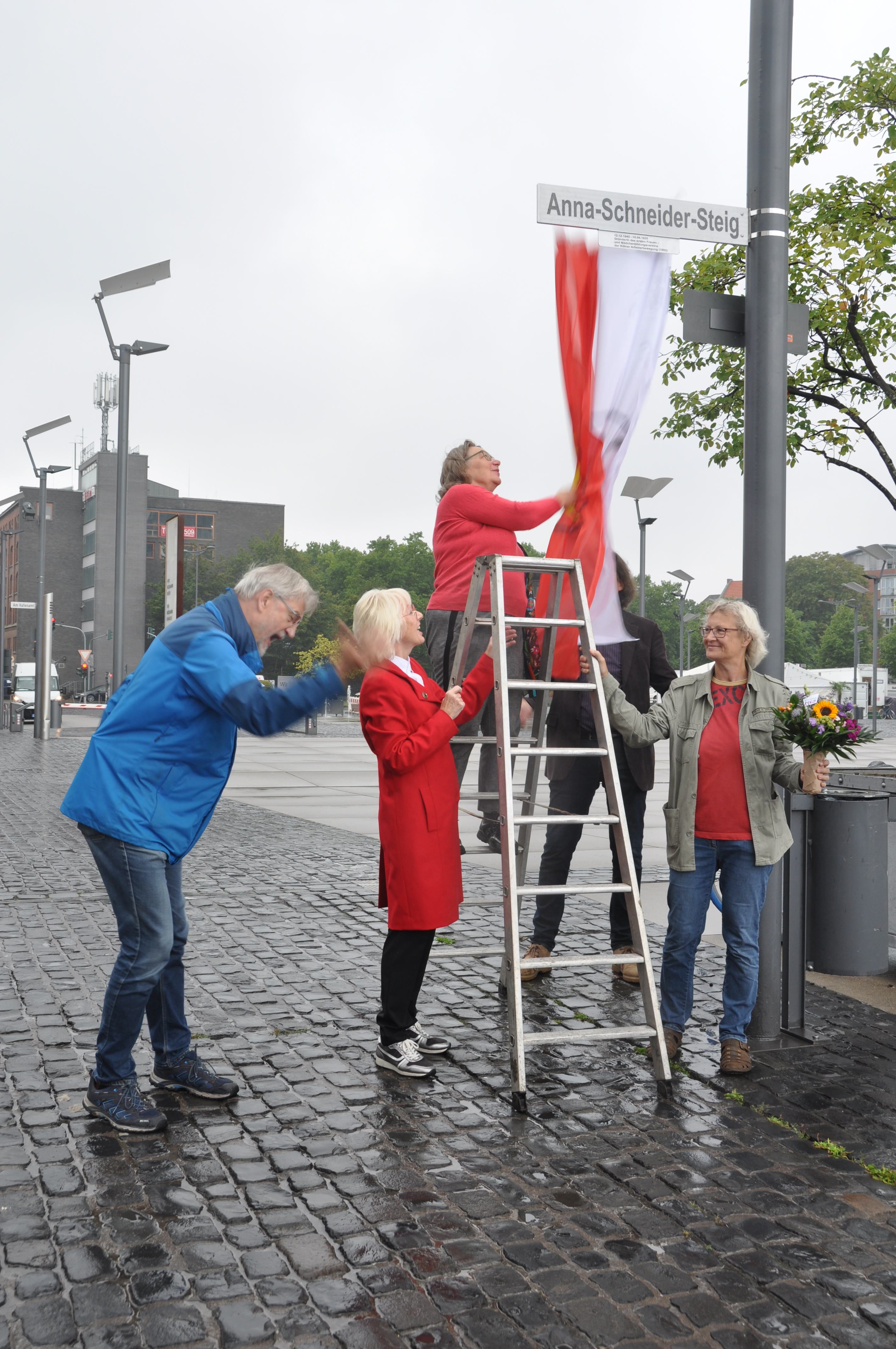 Enthüllung des Straßenschildes "Anna-Schneider-Steig" im Rheinhauhafen Köln. V.l.n.r.: Andreas Hupke, Elfi Scho, Irene Franken, Reinhold Goss, Dr. Astrid Reimers